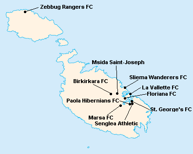 Répartition des clubs en First Division Maltaise 1975-1976.